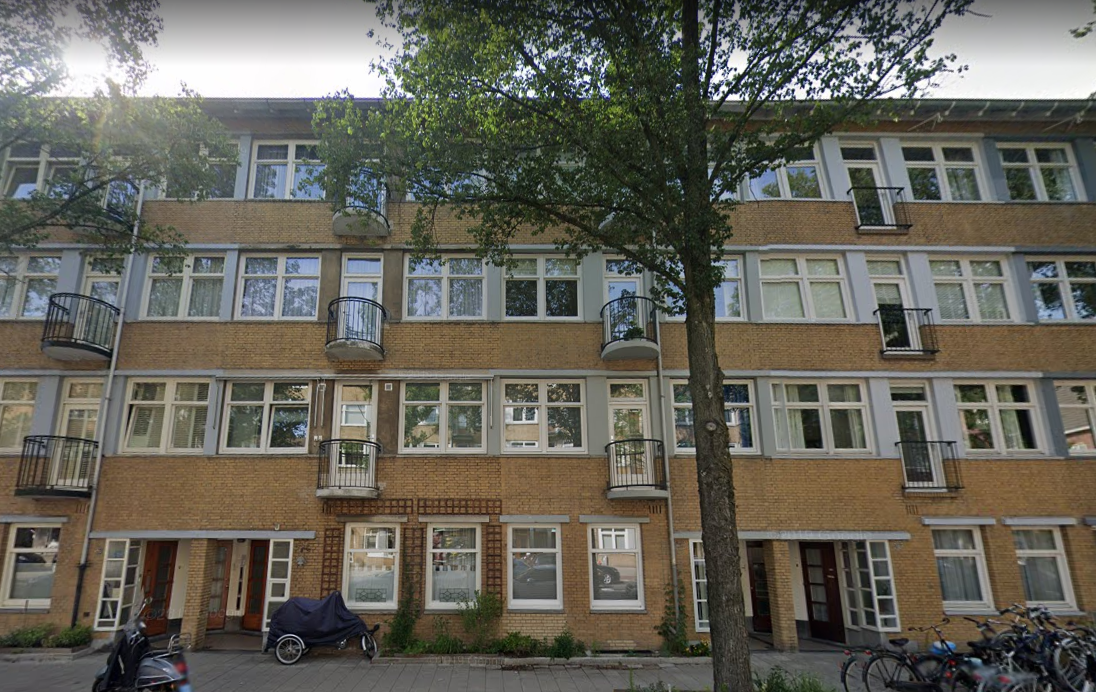 Woningbouw aan de Aalsmeerweg (overblijfsel van het voormalige Sassenheimweg woningbouwproject van Boeken)